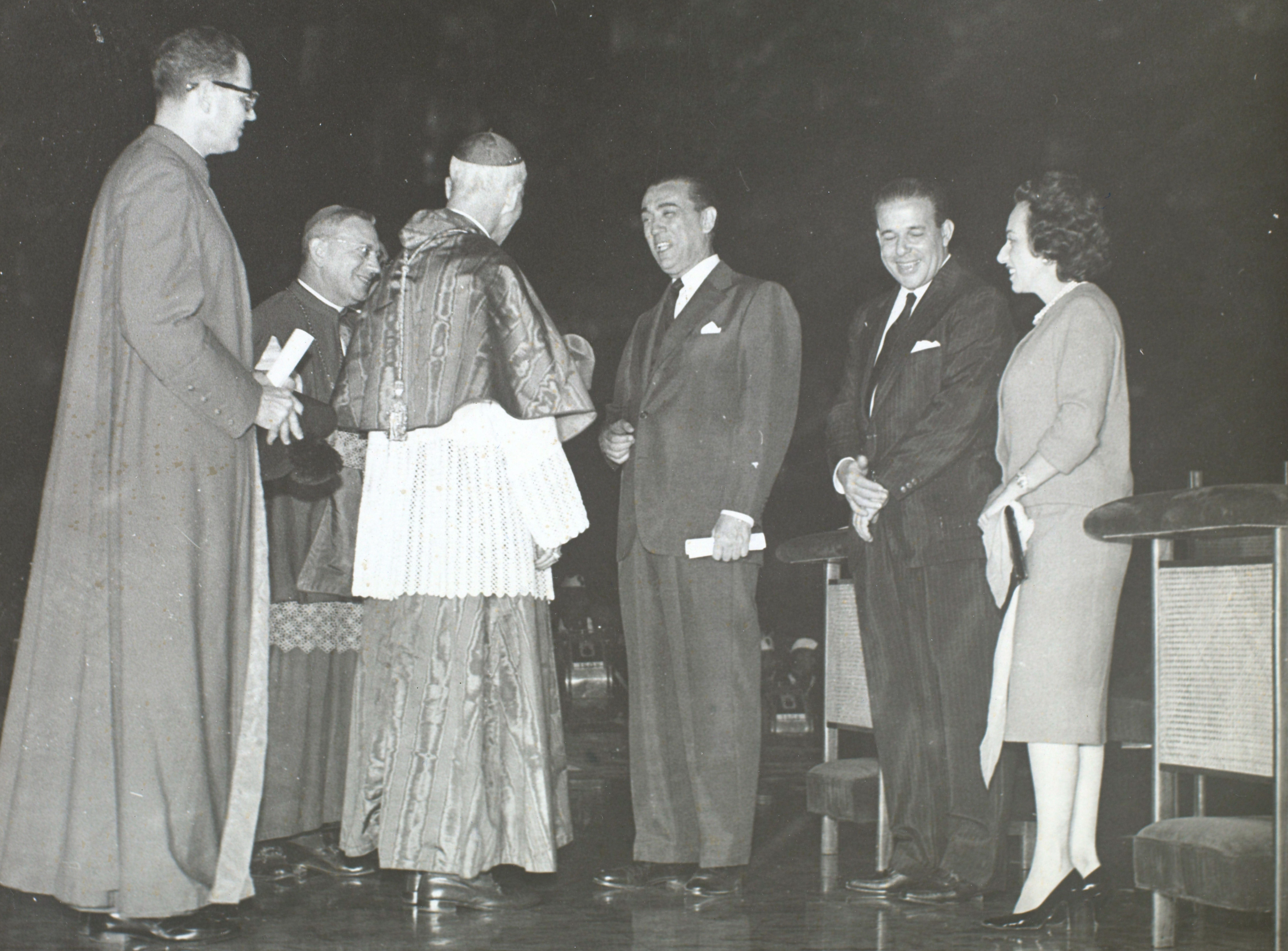 Fotografia do Fundo Correio da Manhã, sob a guarda do Arquivo Nacional.